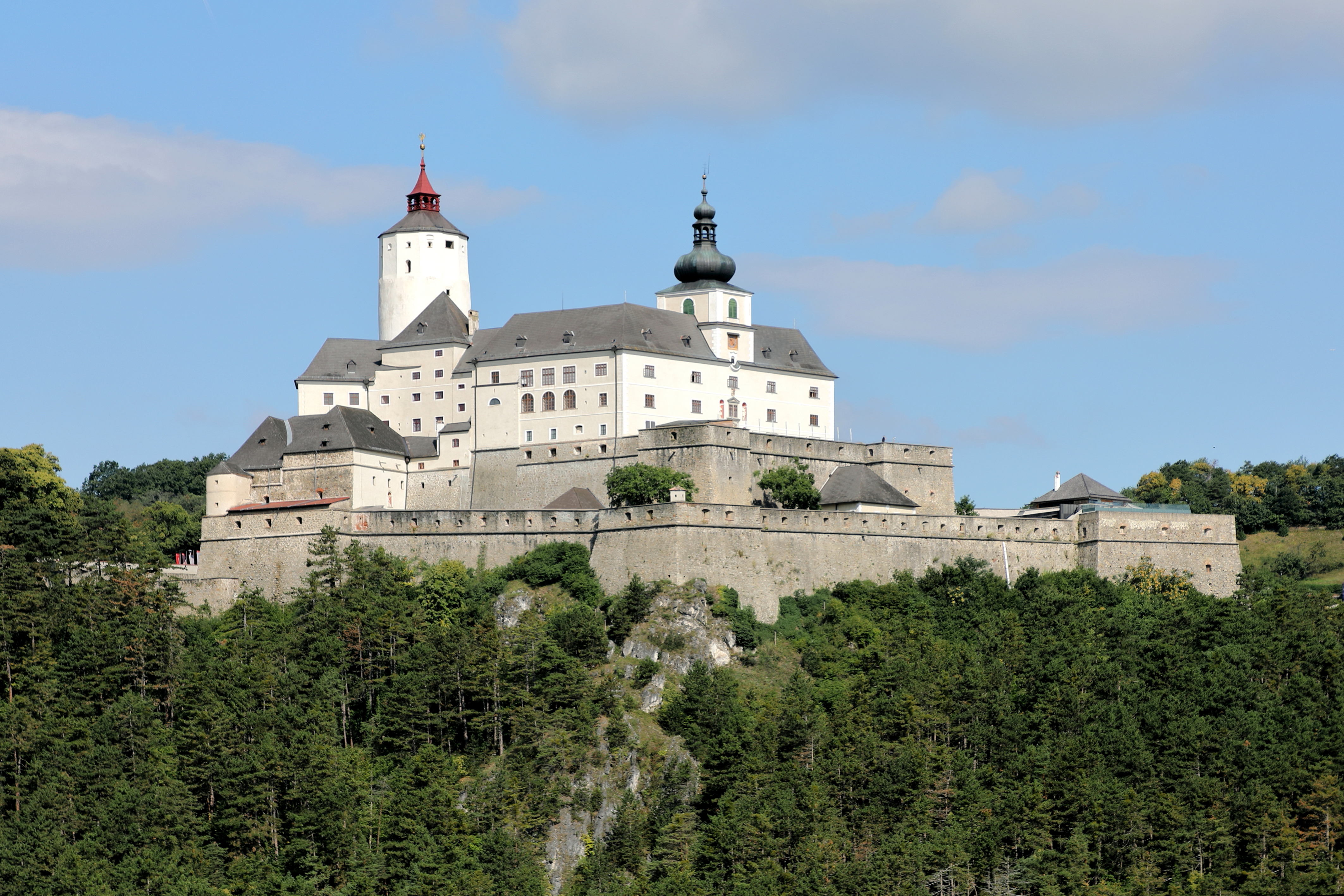 Südostansicht der Burg Forchtenstein in Neustift an der Rosalia, ein Ortsteil der burgenländischen Gemeinde Forchtenstein.Die Burg befindet sich auf einem steilen Dolomitfelsen am Ostabhang des Rosaliengebirges und sicherte die Straßenverbindung Wr. Neustadt - Ödenburg (heutiges Sopron). Sie wurde ab dem 14. Jahrhundert von den Grafen von Mattersdorf errichtet. Nachdem die Burg 1626 in den Besitz der Esterházy gelangte, wurde sie im 17. Jahrhundert umfangreich um- und ausgebaut.